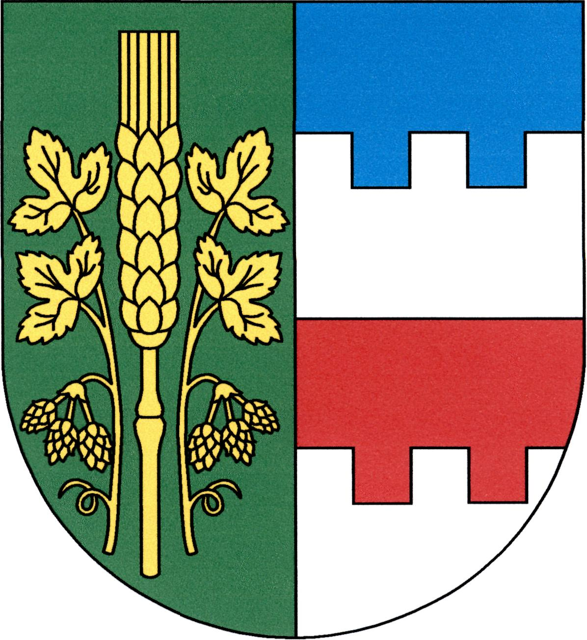 Znak obce Zbrašín